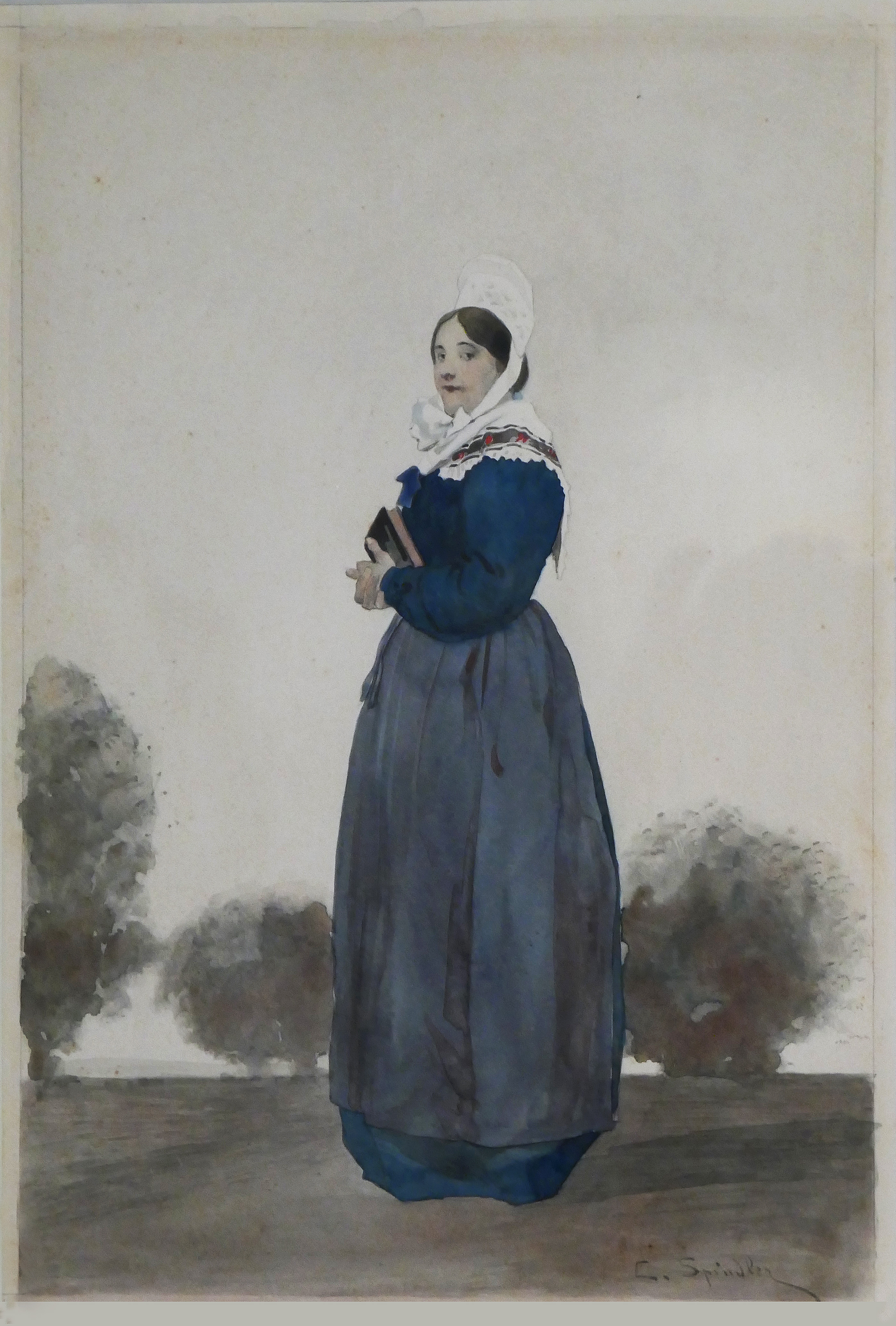 Charles Spindler, Jeune fille de Schleithal (Outre-Forêt). Aquarelle, vers 1890-1900. Collections du Musée alsacien de Strasbourg. Exposition temporaire Costumes d'Alsace, étoffes d'un monde au Musée alsacien de Strasbourg (2018).